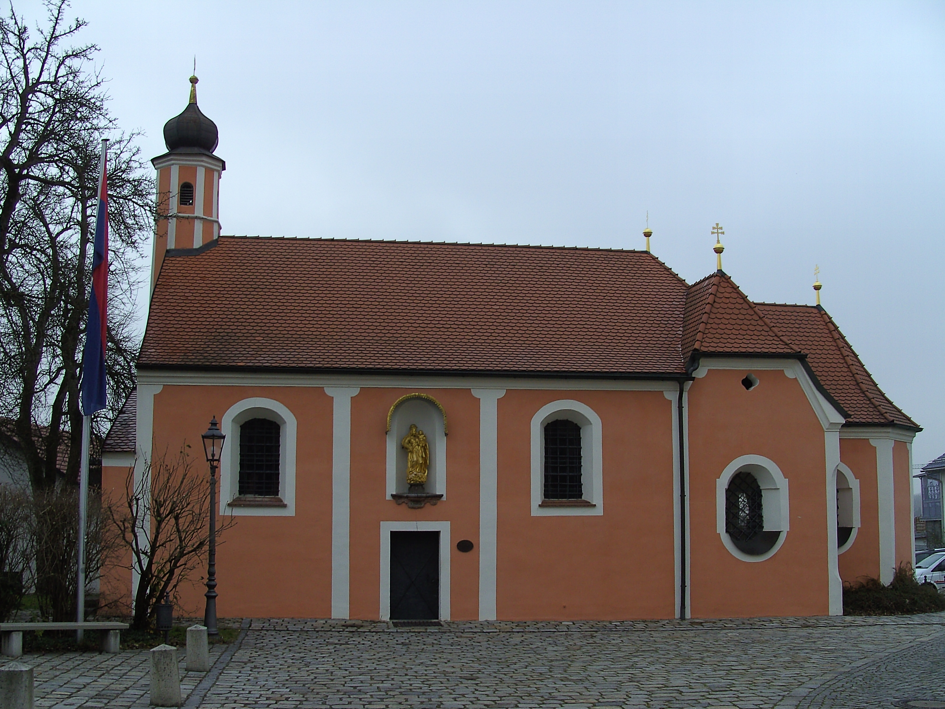 Die, 1640 eingeweihte, Wallfahrtskapelle "Maria, Zuflucht der Sünder" in Altenmarkt, Osterhofen.